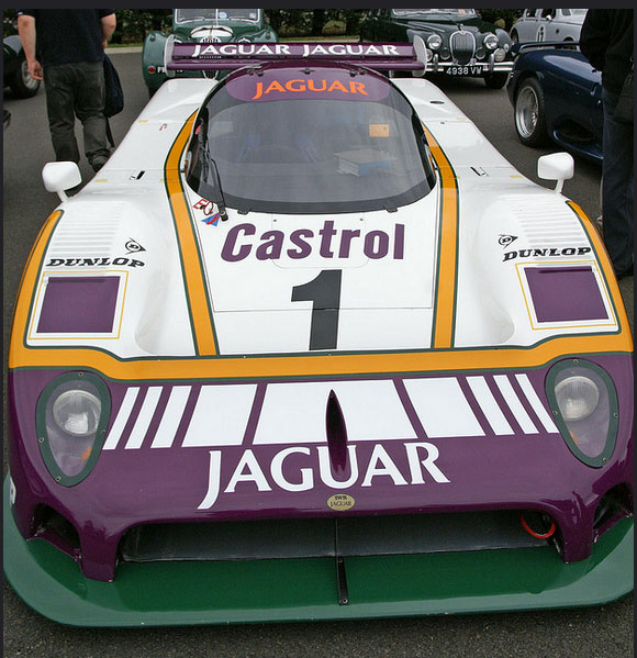 Photographie de la Jaguar XJR-9, vue à Silverstone Classic 2009.